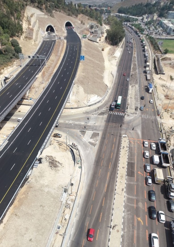 מימין כביש שבעים והכניסה ליוקנעם, במרכז צומת הכנסיה לאוסם, משמאל כביש שש לצפון